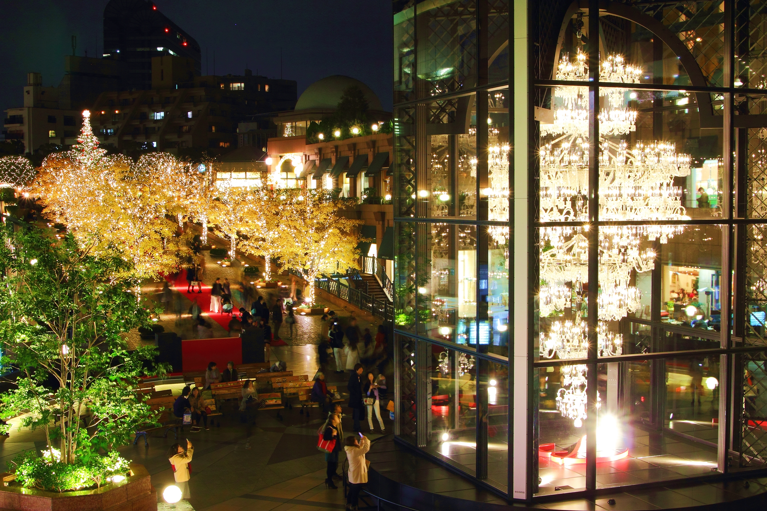 恵比寿ガーデンプレイスのイルミネーション2014